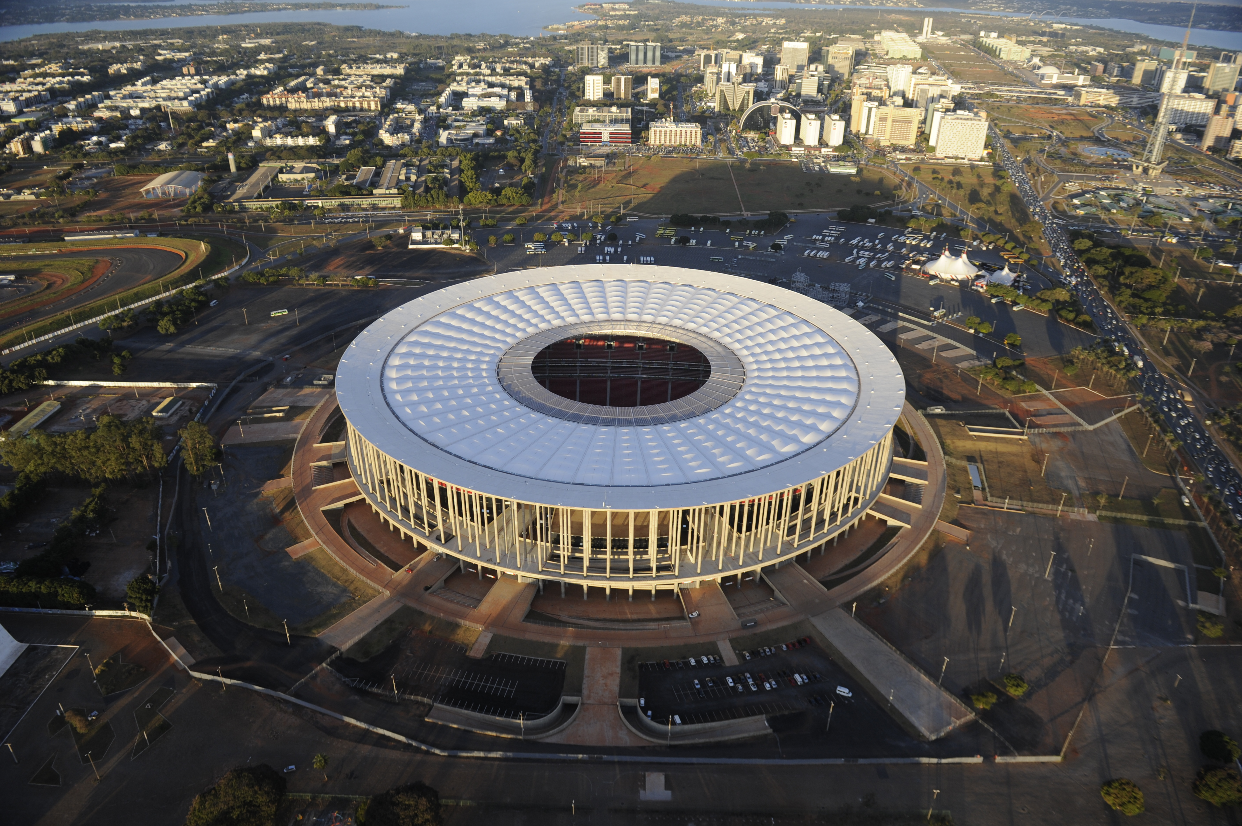 Vista aérea do Estádio Nacional de Brasília, também conhecido como Estádio Nacional Mané Garrincha - Brasília/DF. Foto: Ana Volpe/Agência Senado